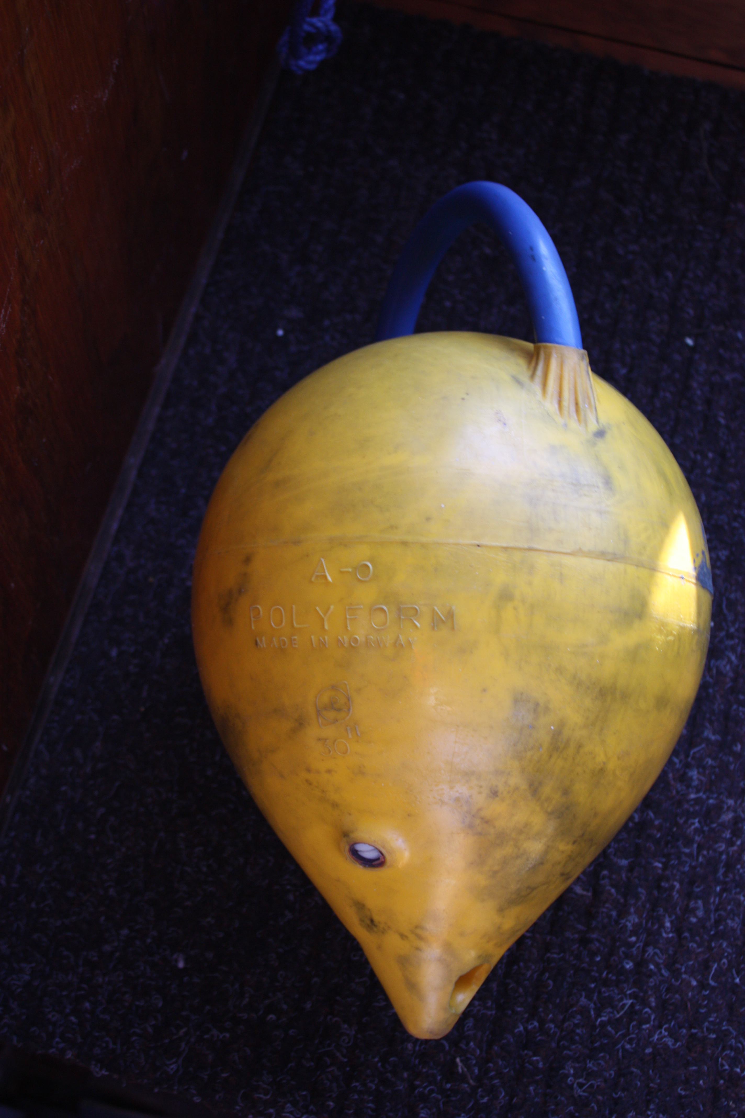 Döpper